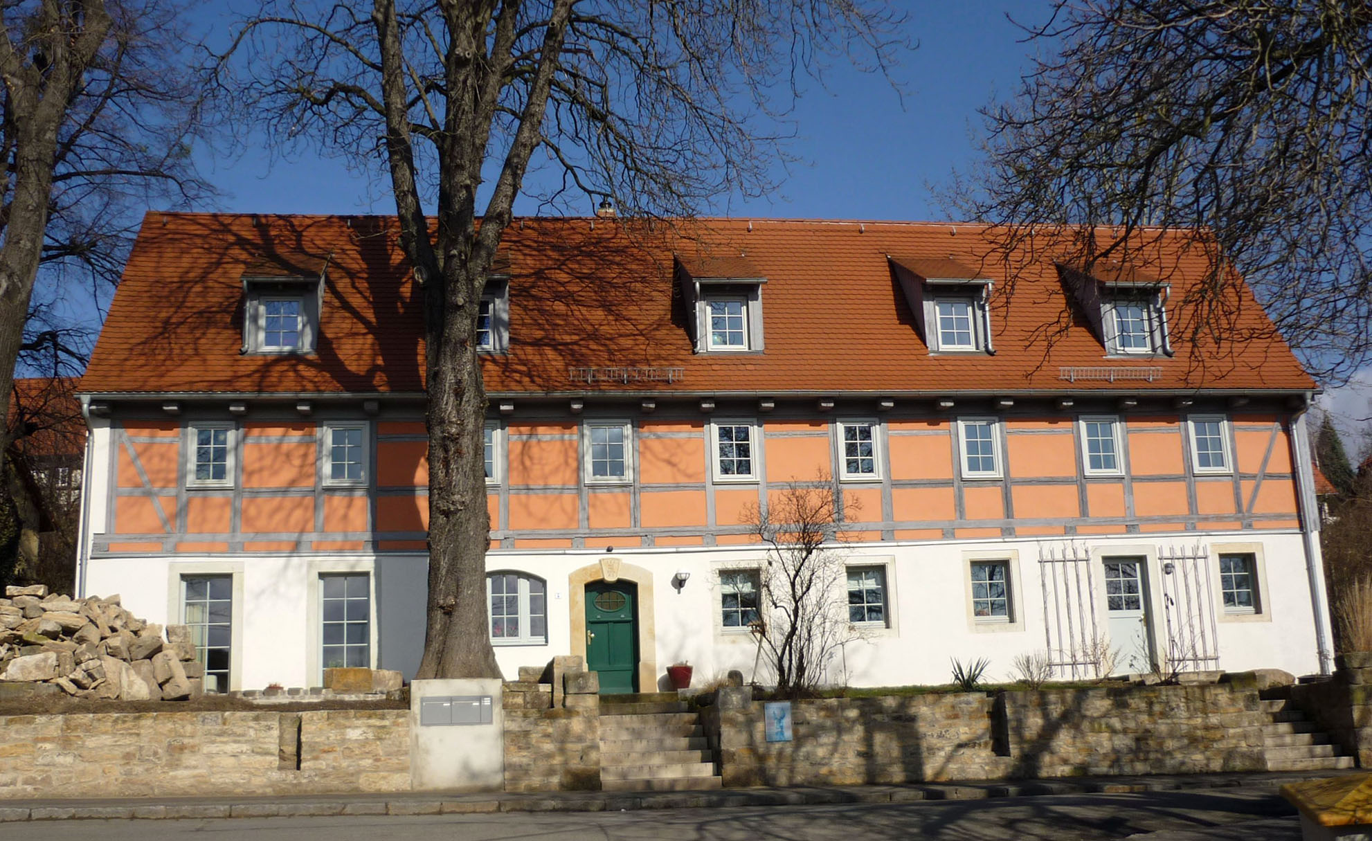 Eigenheimstr. 1 in Dresden-Kleinpestitz